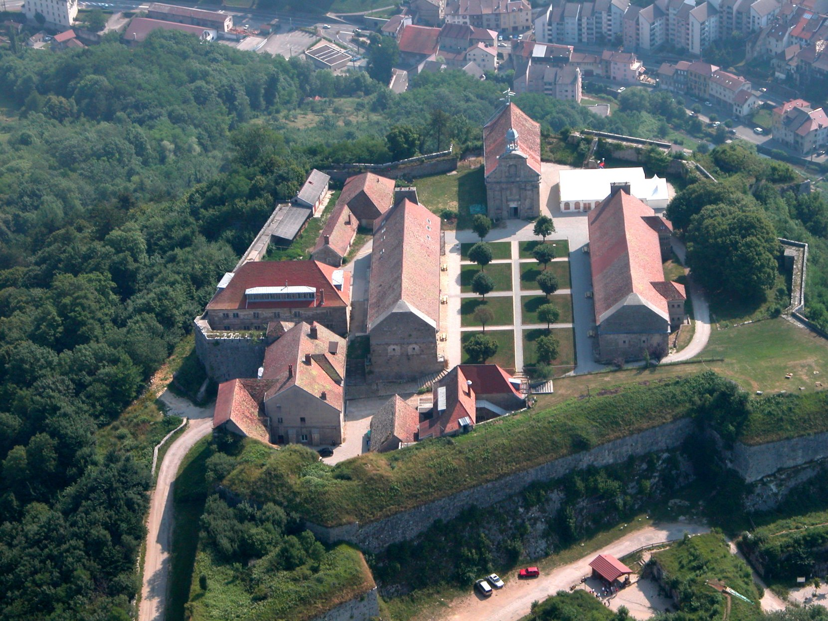 Vue aérienne du Fort St André à Salins les Bains, Jura, France